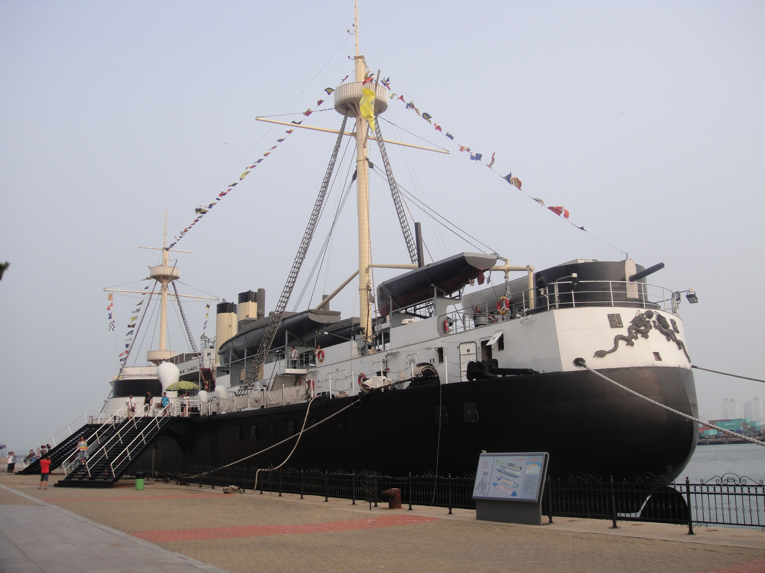 山东威海的定远号仿制品